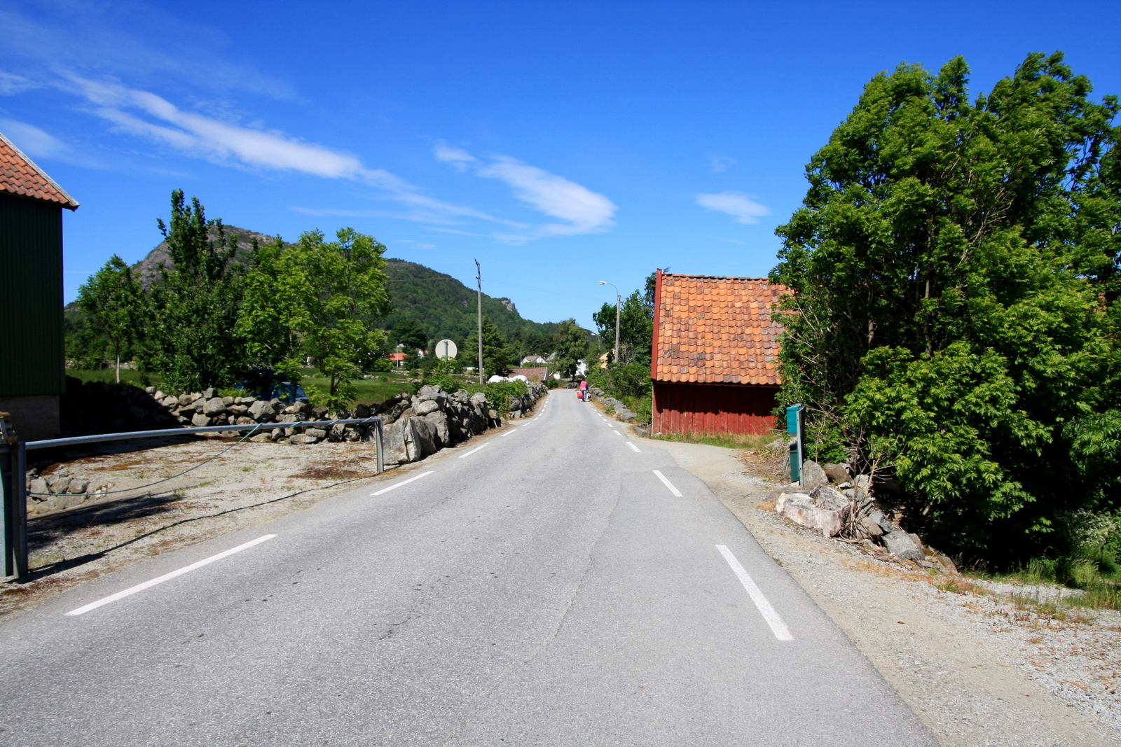 Fylkesvei 318 Bergsagel